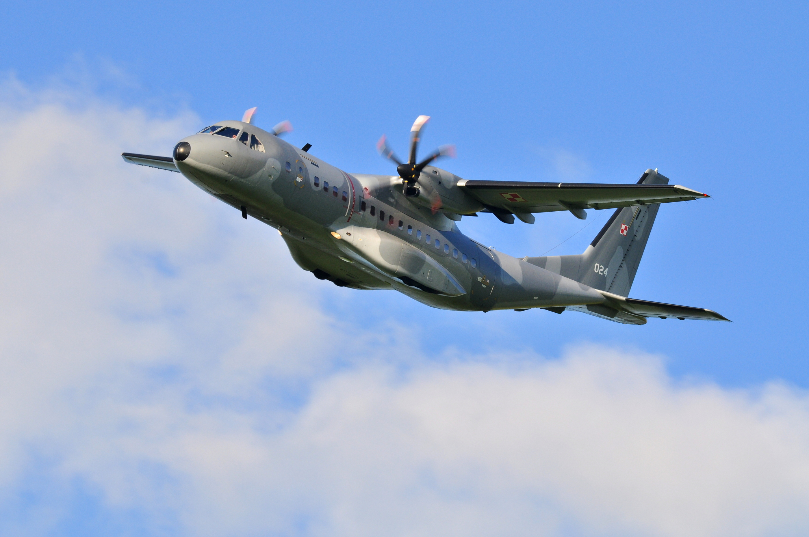 Samolot transportowy CASA C-295 (#024) stacjonująca w 8 Bazie Lotnictwa Transportowego w Krakowie